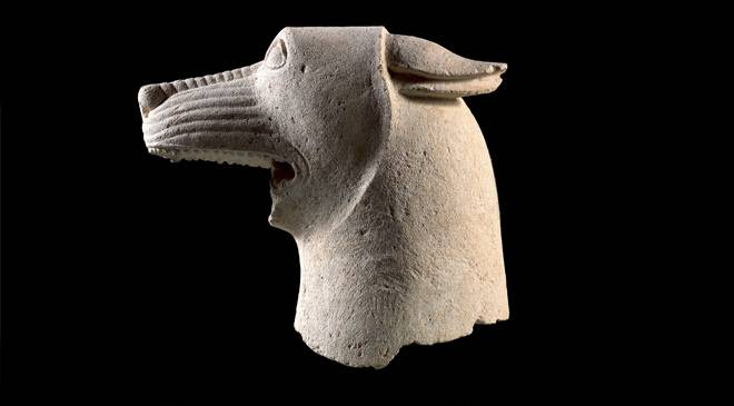 Cabeza del Lobo del Pajarillo